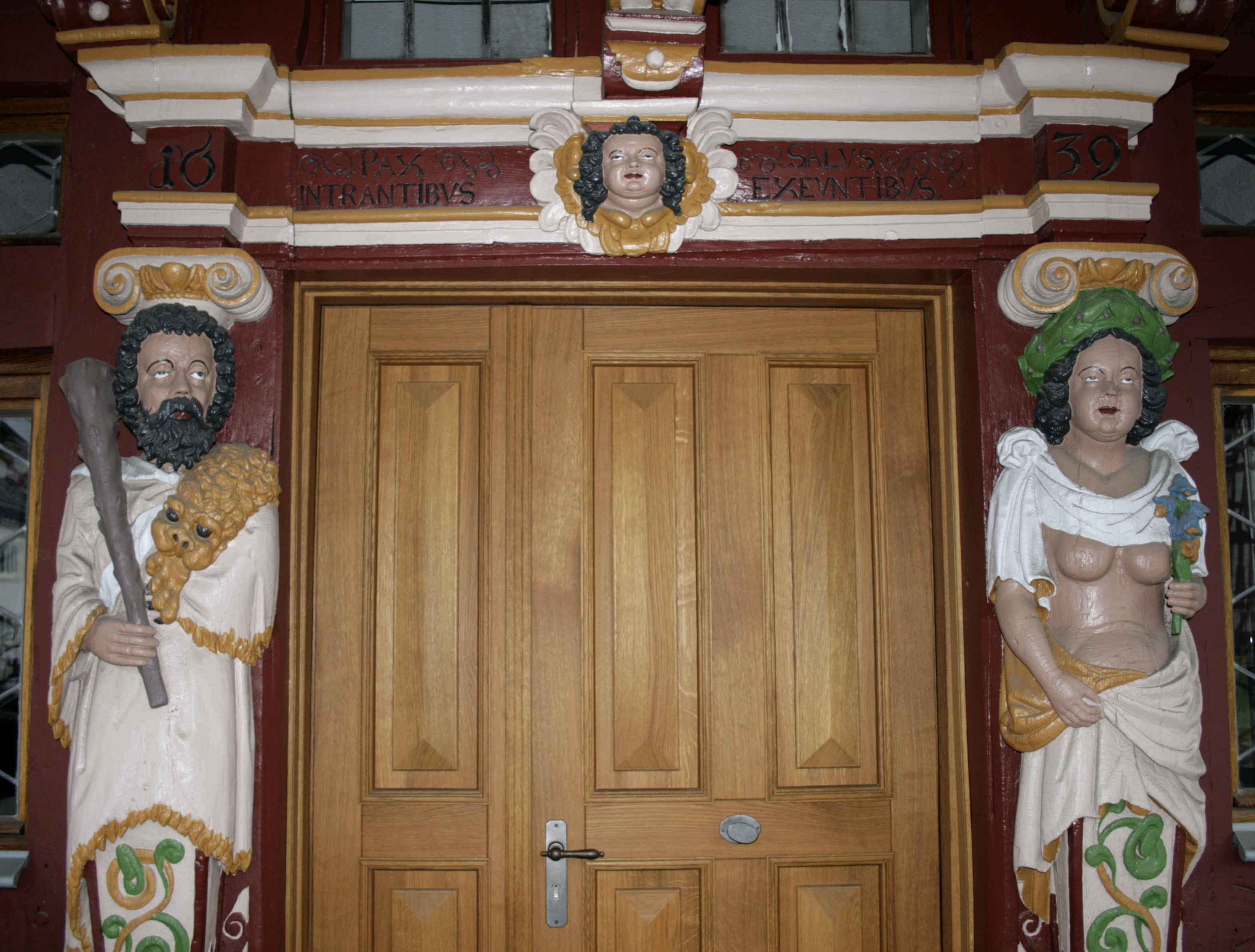 Portal des Rathauses in Hadamar, Deutschland